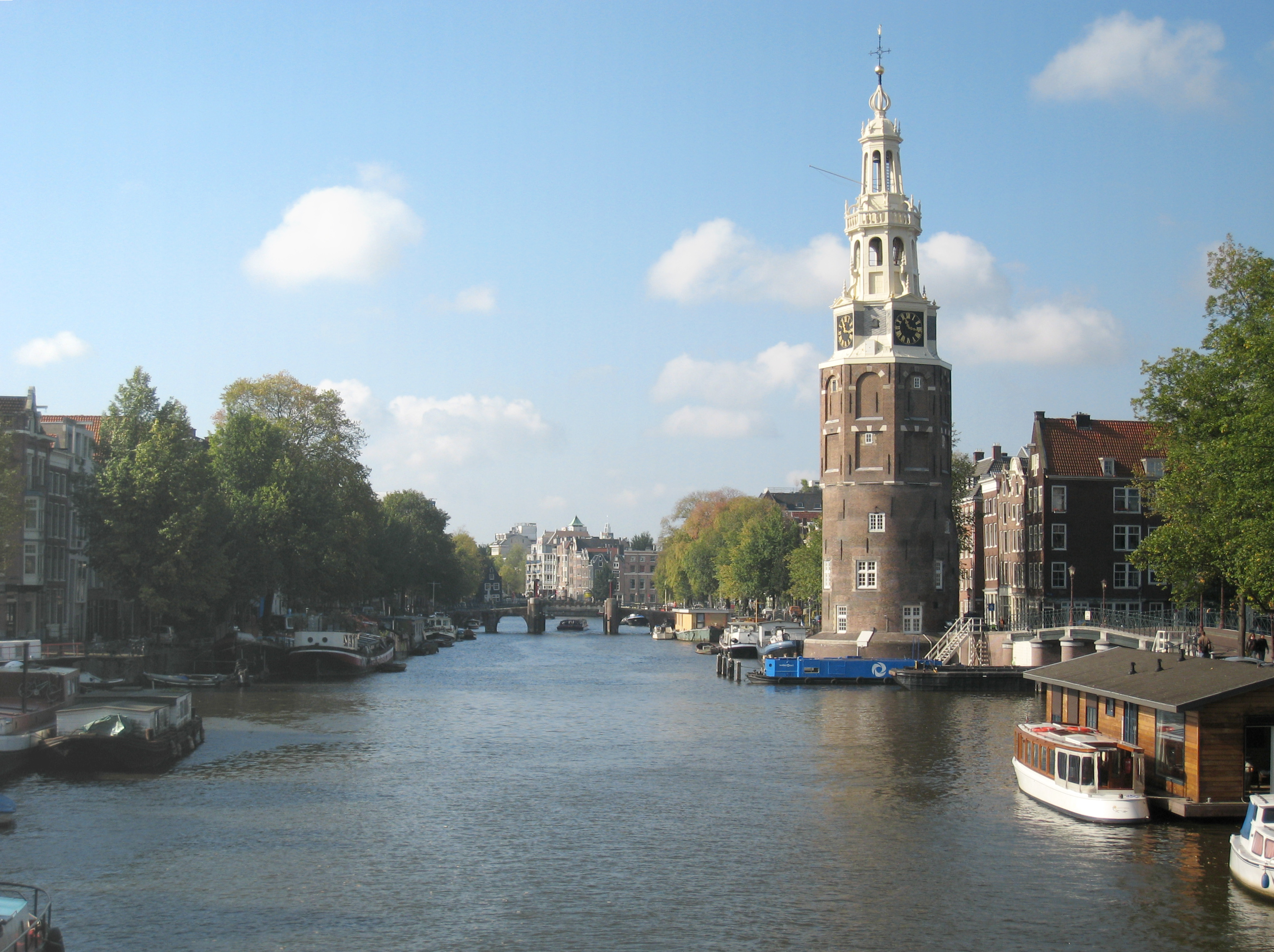 De Oude Schans of Oudeschans, oorspronkelijk Nieuwe Gracht, is een brede gracht in het centrum van Amsterdam die van de Sint Antoniesluis (tussen Sint Antoniebreestraat en Jodenbreestraat) naar het Oosterdok stroomt. De gracht is vooral bekend om de 16e-eeuwse Montelbaanstoren.